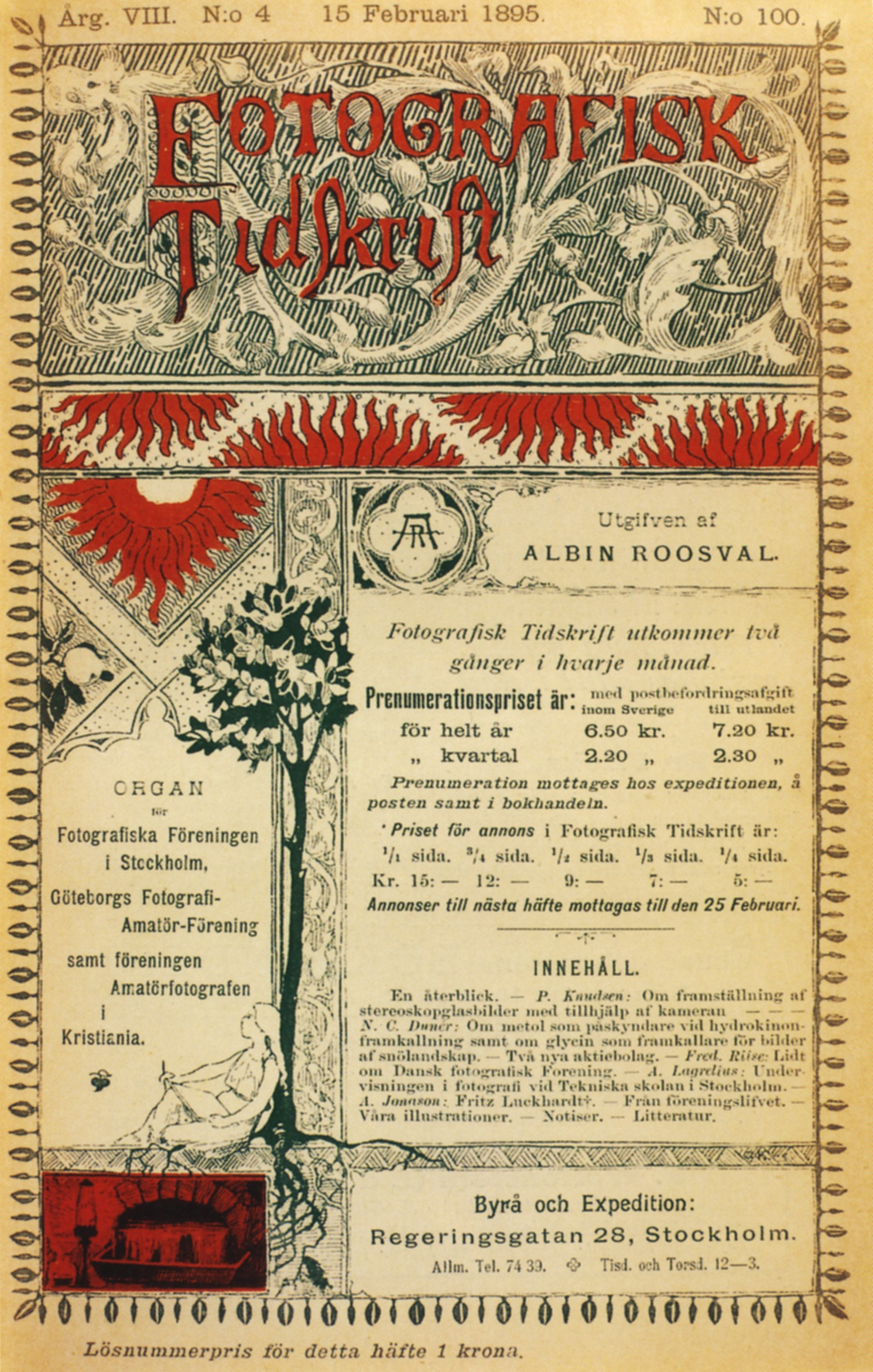 Fotografisk Tidskrift nr 4. årgång VIII, 1895